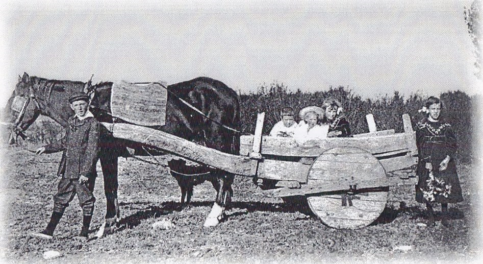 Carro de Cadfan Hughes construido en 1866 en el valle del Chubut, un año después del desembarco del Mimosa.